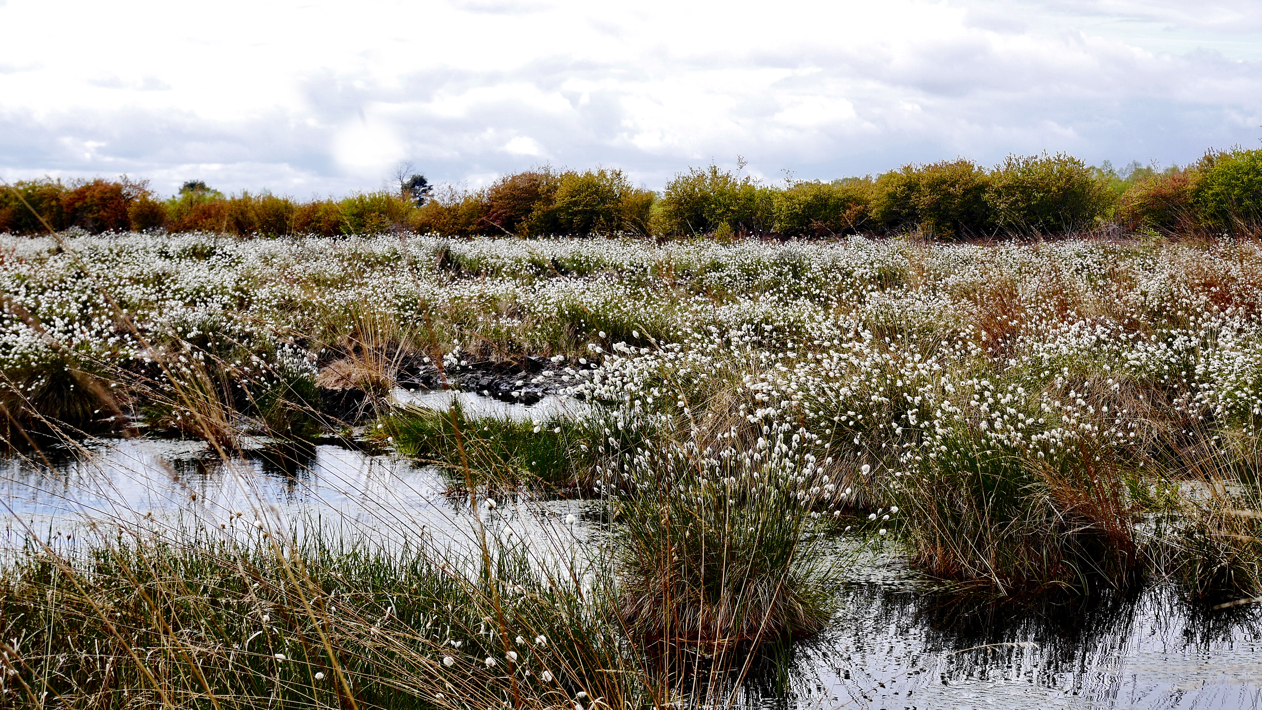 Das Wollgras befindet sich im NSG Goldenstedter Moor. Das Goldenstedter Moor ist ein Hochmoorgebiet. Das Goldenstedter Moor wurde im Rahmen des Niedersächsischen Moorschutzprogrammes 1984 zu Naturschutzgebiet erklärt.